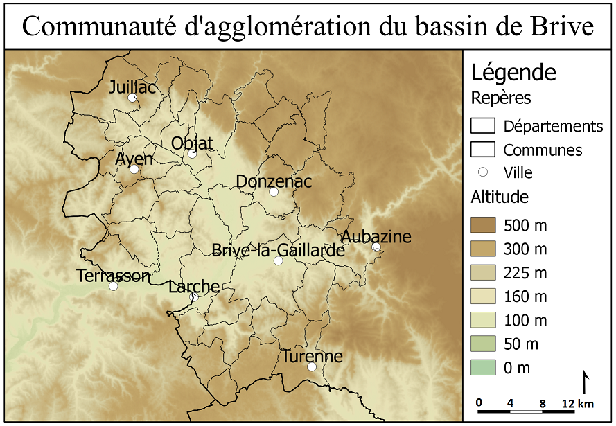 Carte de la communauté d'agglomération du bassin de Brive-la-Gaillarde